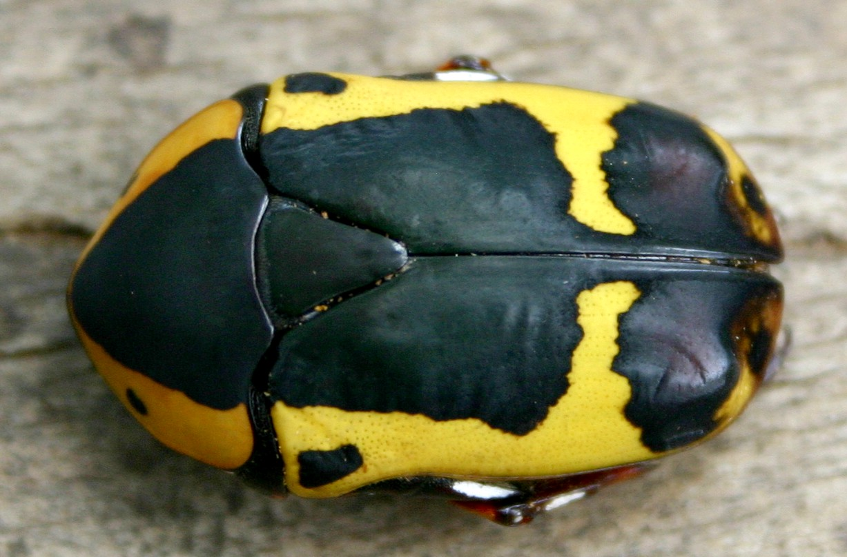 Pachnoda sinuata - Garden fruit chafer